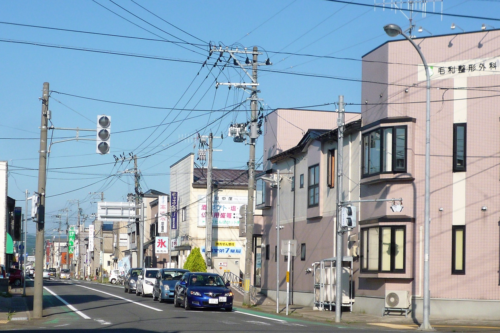 秋田県道102号大館鷹巣線 終点の住吉町交差点（秋田県北秋田市）